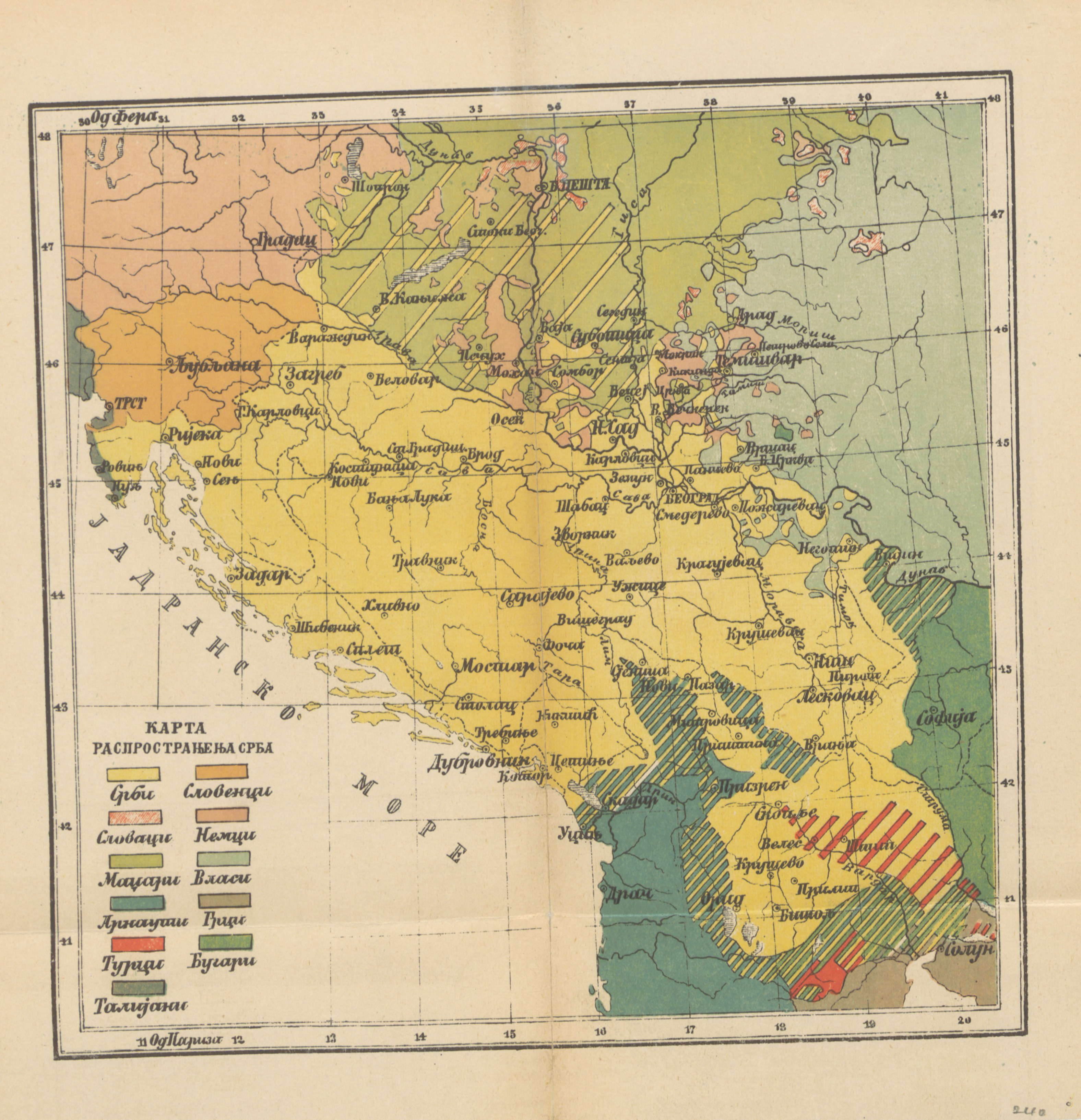 Image taken from page 969 of 'Србија, опис земле, народа и државе ... Илустровао ... В. Тителбах' (11188254174)